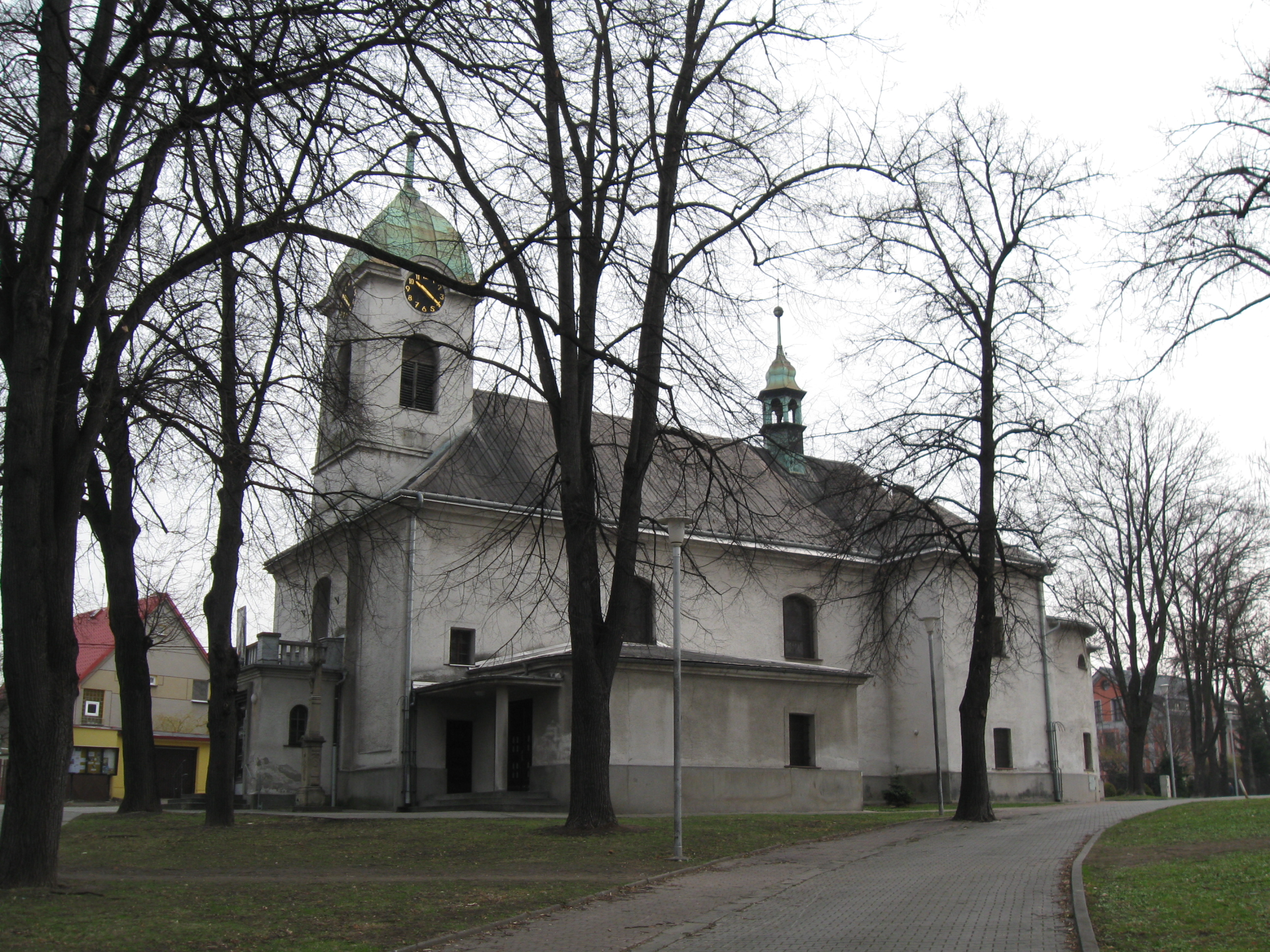 Kostel Navštívení Panny Marie v Ostravě-Zábřehu